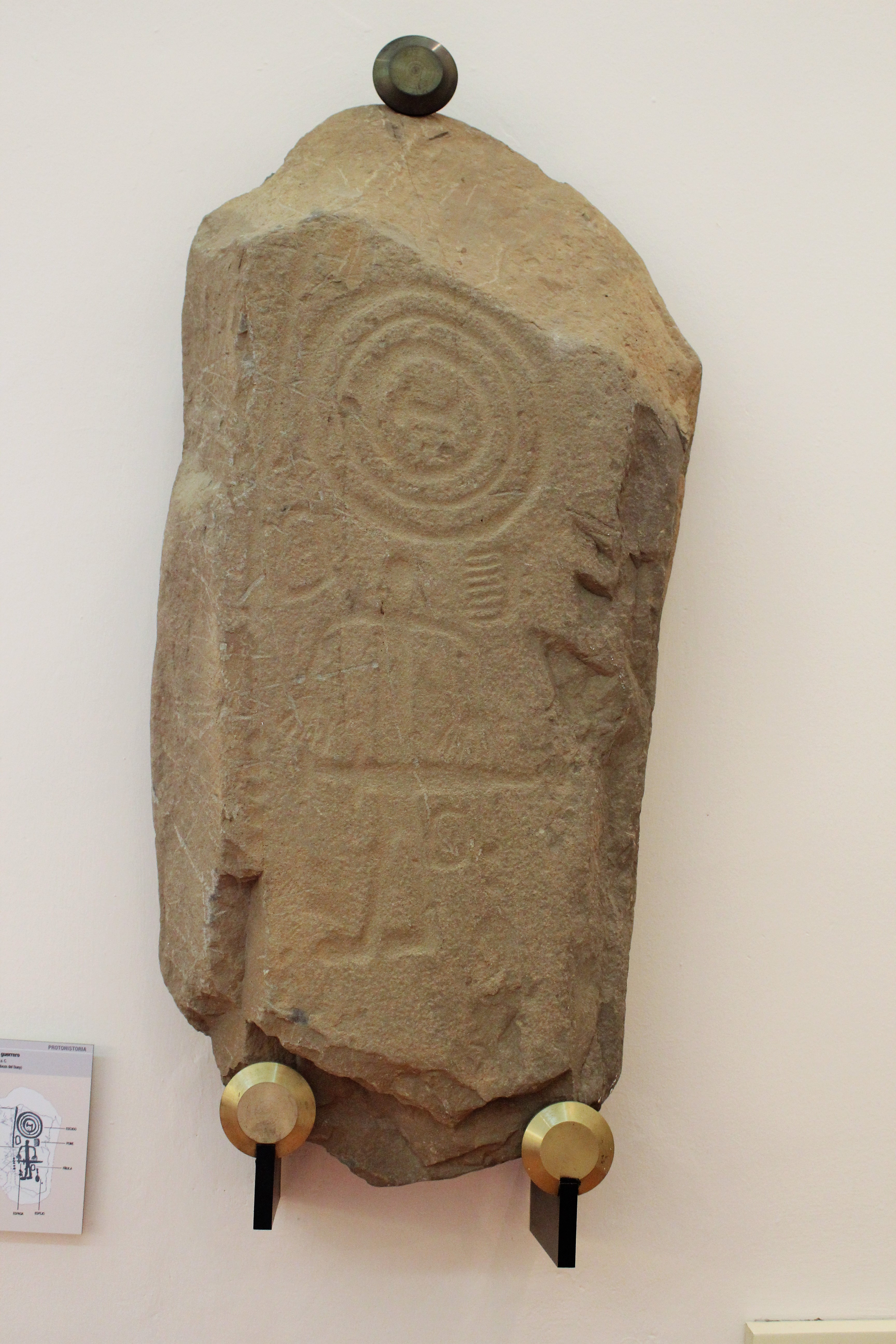 Protohistoria. Estela de guerrero. Siglo VII-VI a.C. El Corchito. Cabeza del Buey.